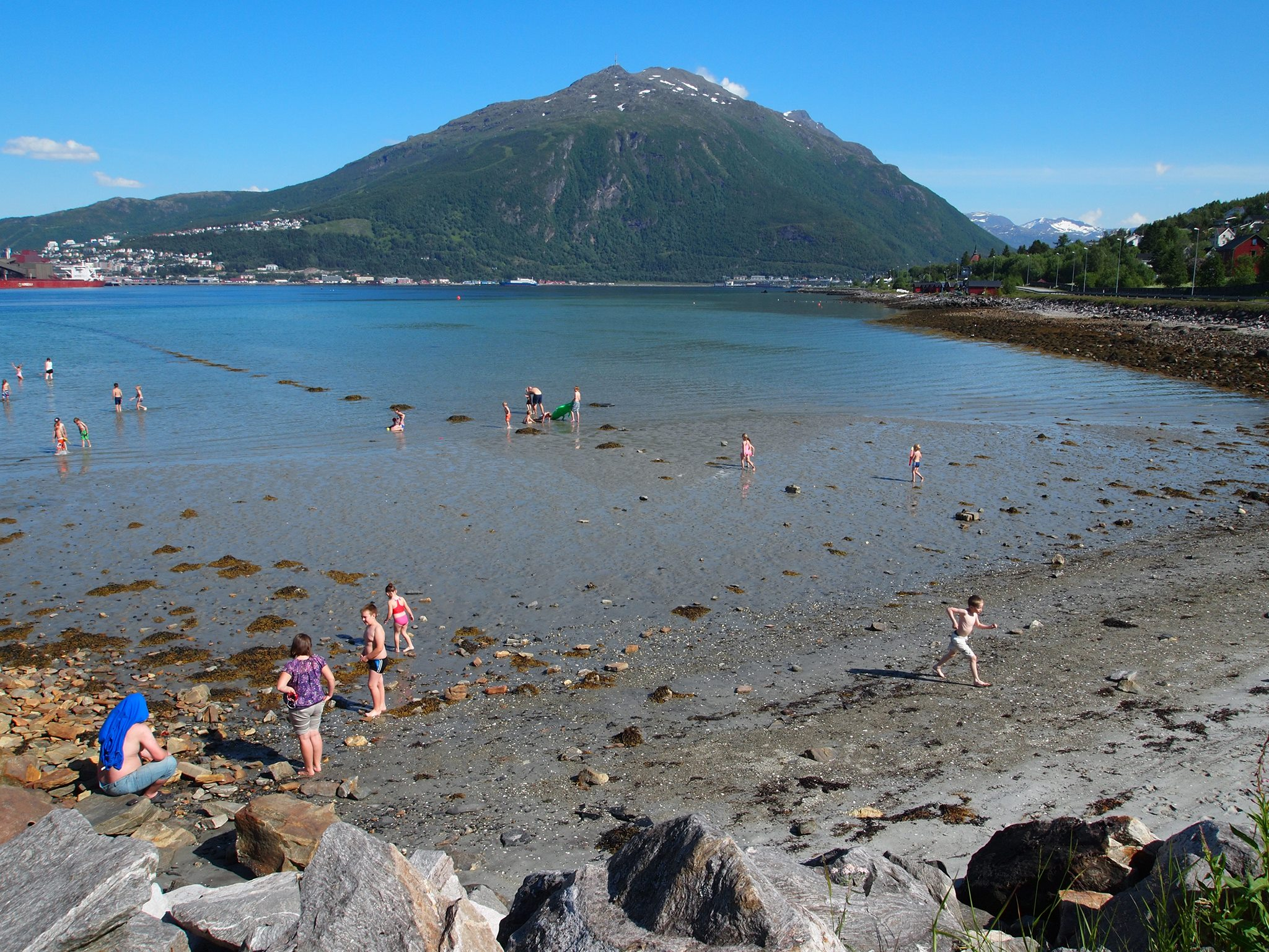 Ankenesleira sett fra småbåthavna mot Fagernesfjellet